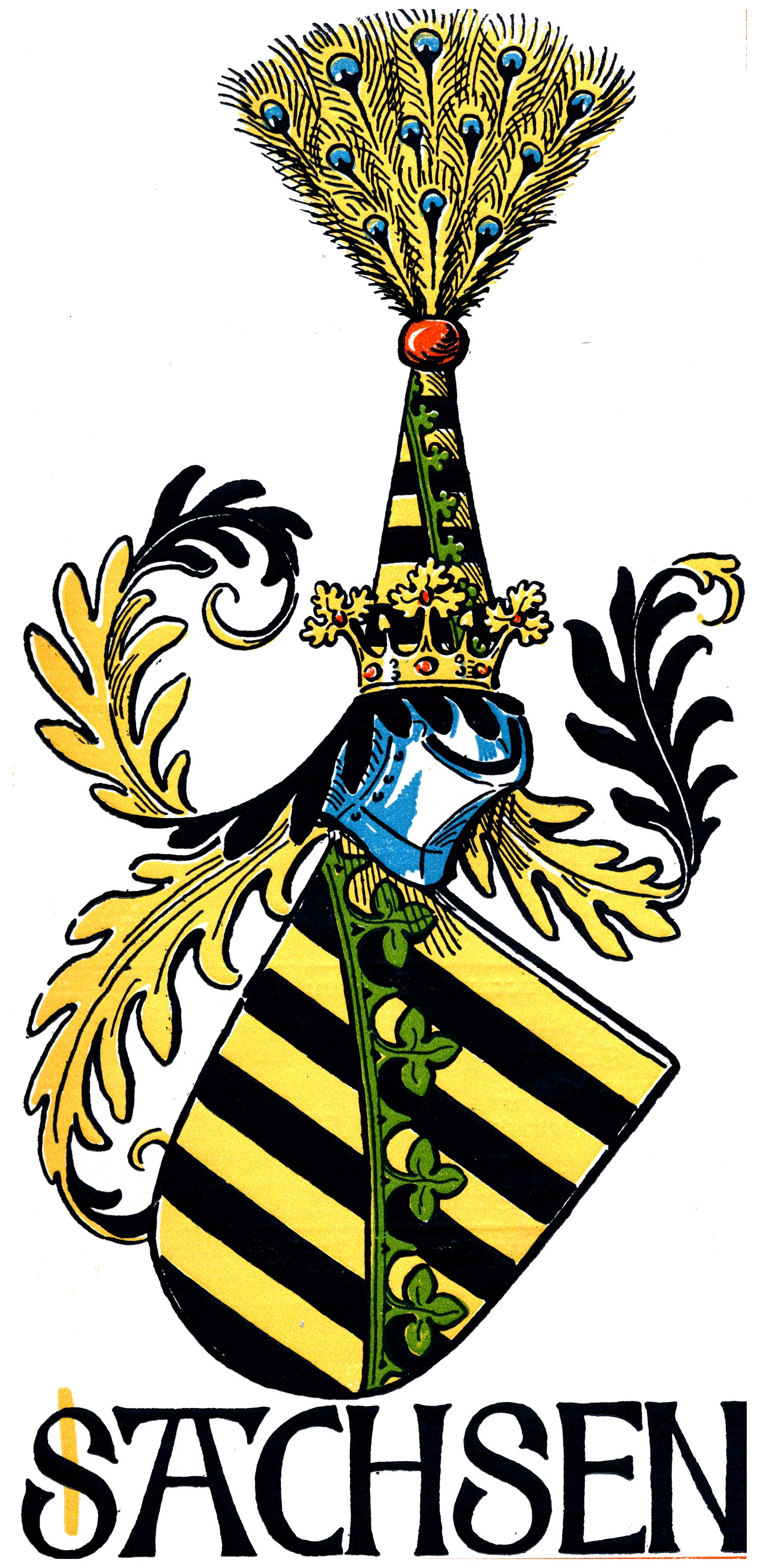 Wappen von Sachsen